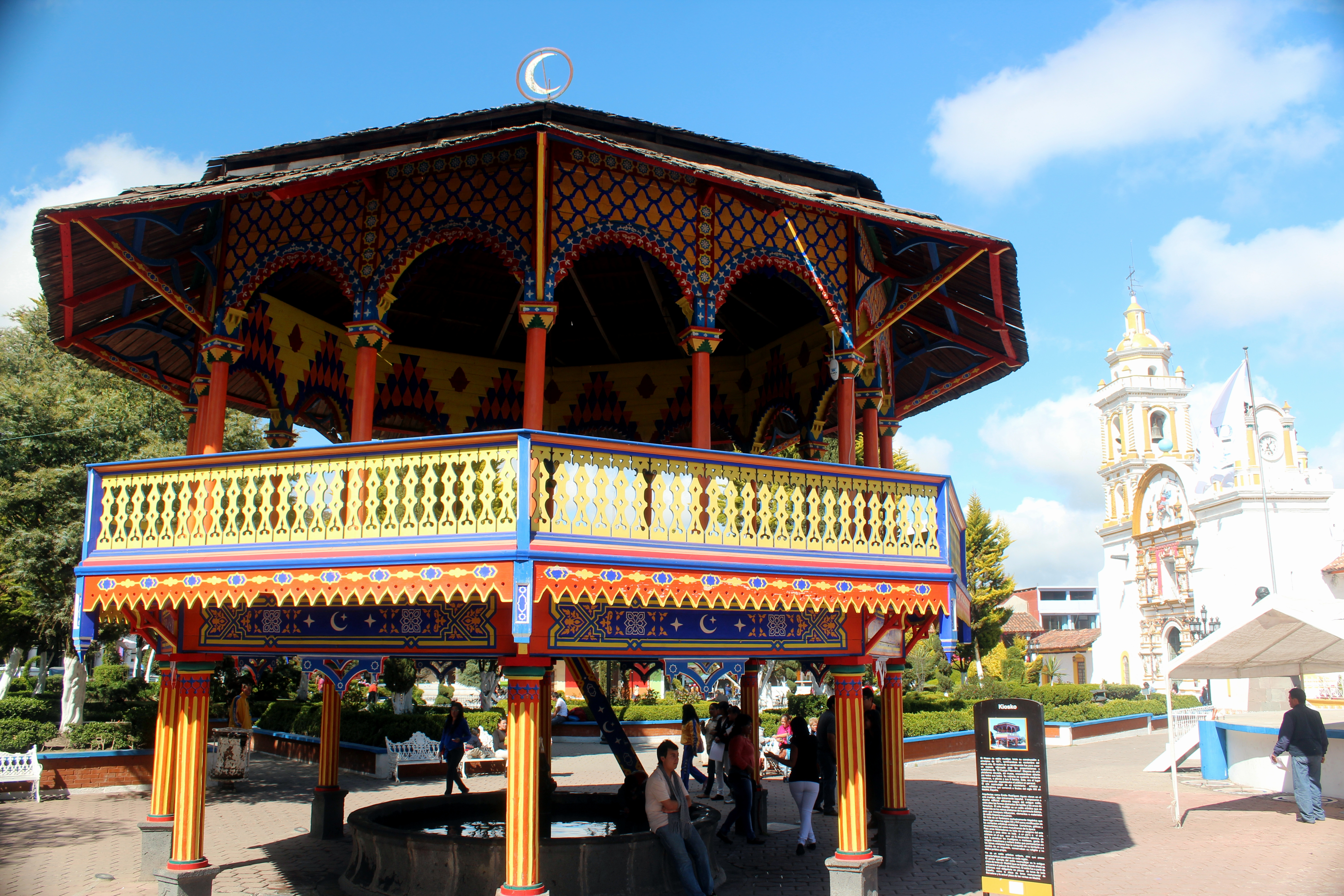 Kiosco de la Plaza de Armas de Chignahuapan Puebla